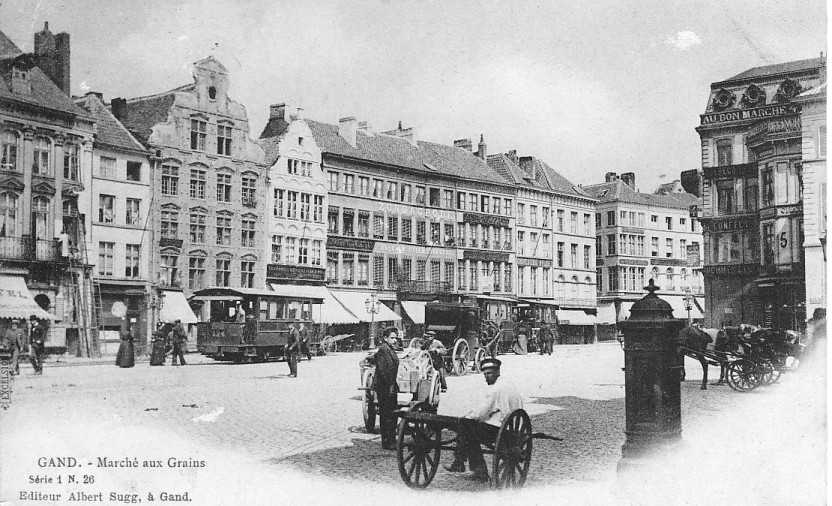 Accutram op de Korenmarkt te Gent